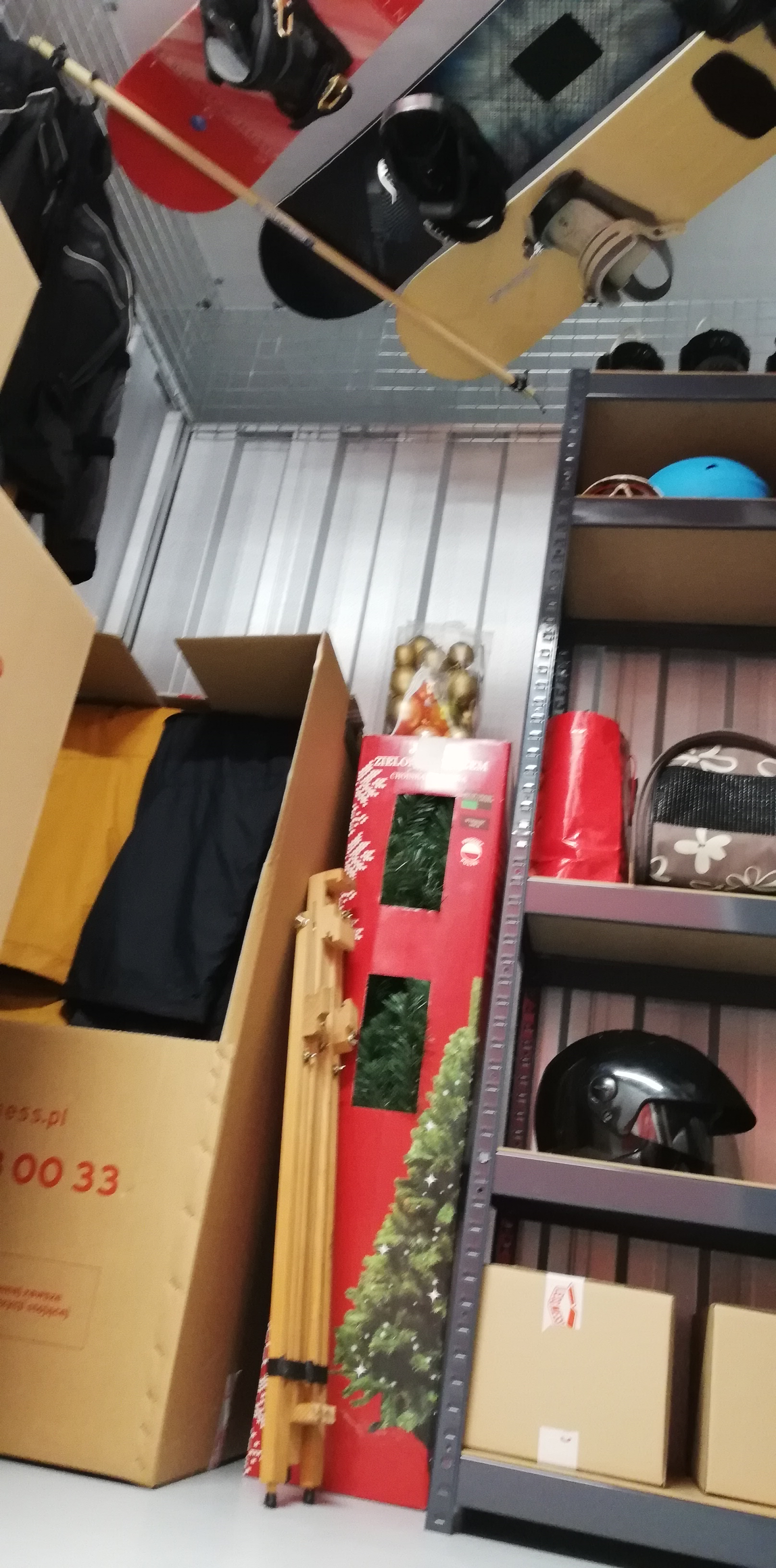 Magazyny self storage bardzo często pełnią funkcję szafy po za domem